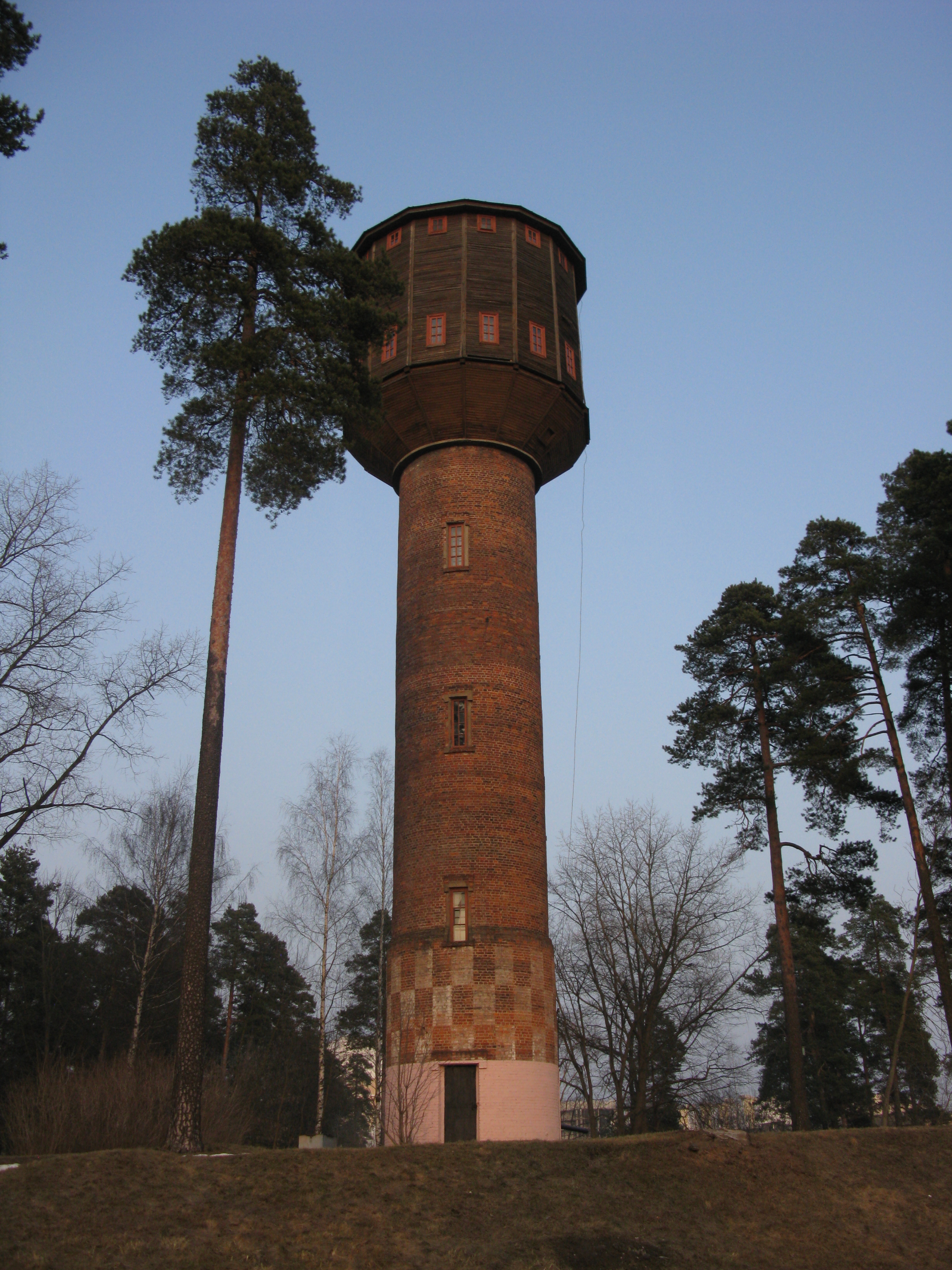 Кирпичная водонапорная башня, ул Карвата В.Н., микрорайон Степянка, Минск, Беларусь.